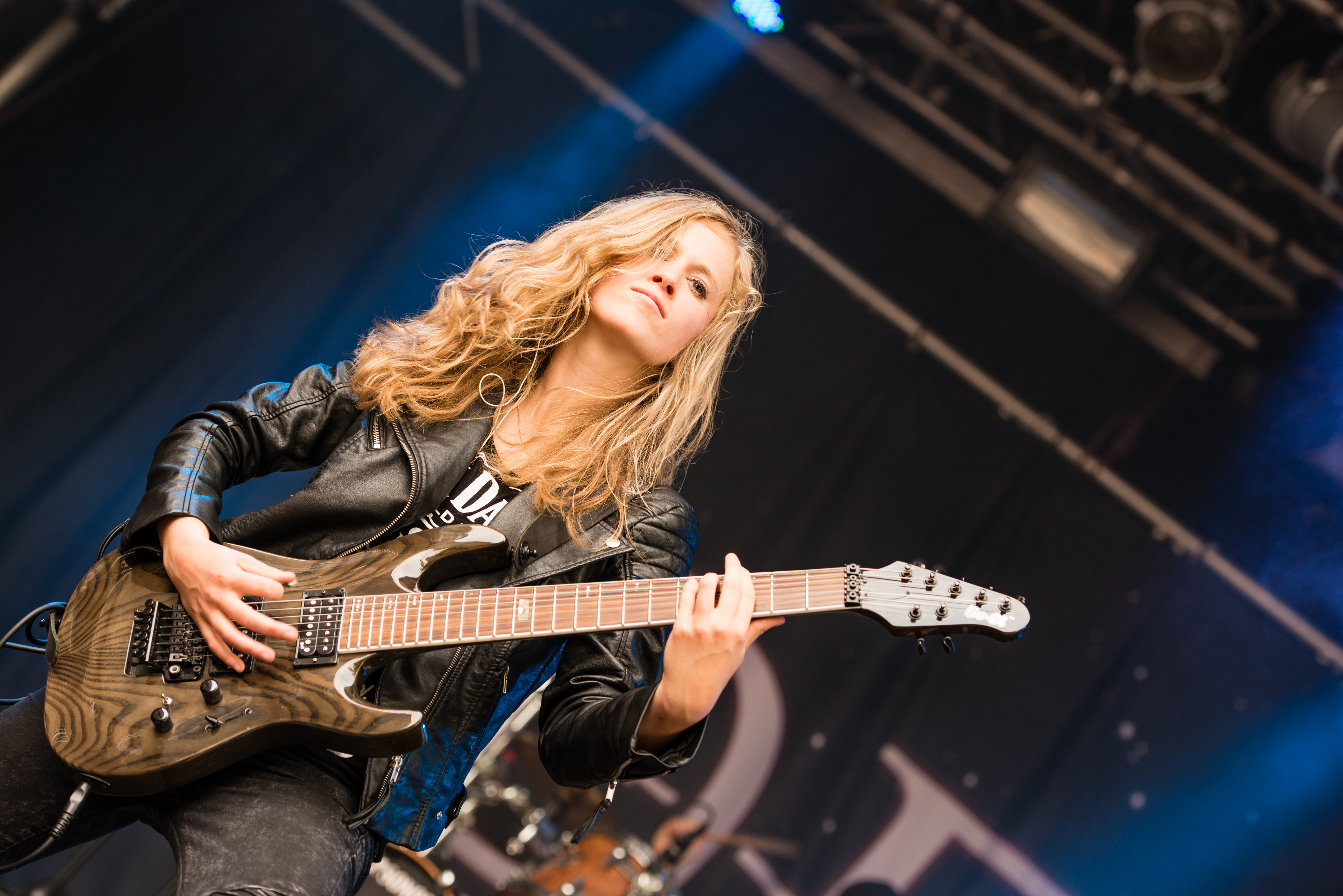 'Castle Rock 2014 - Mülheim an der Ruhr': 'Delain'